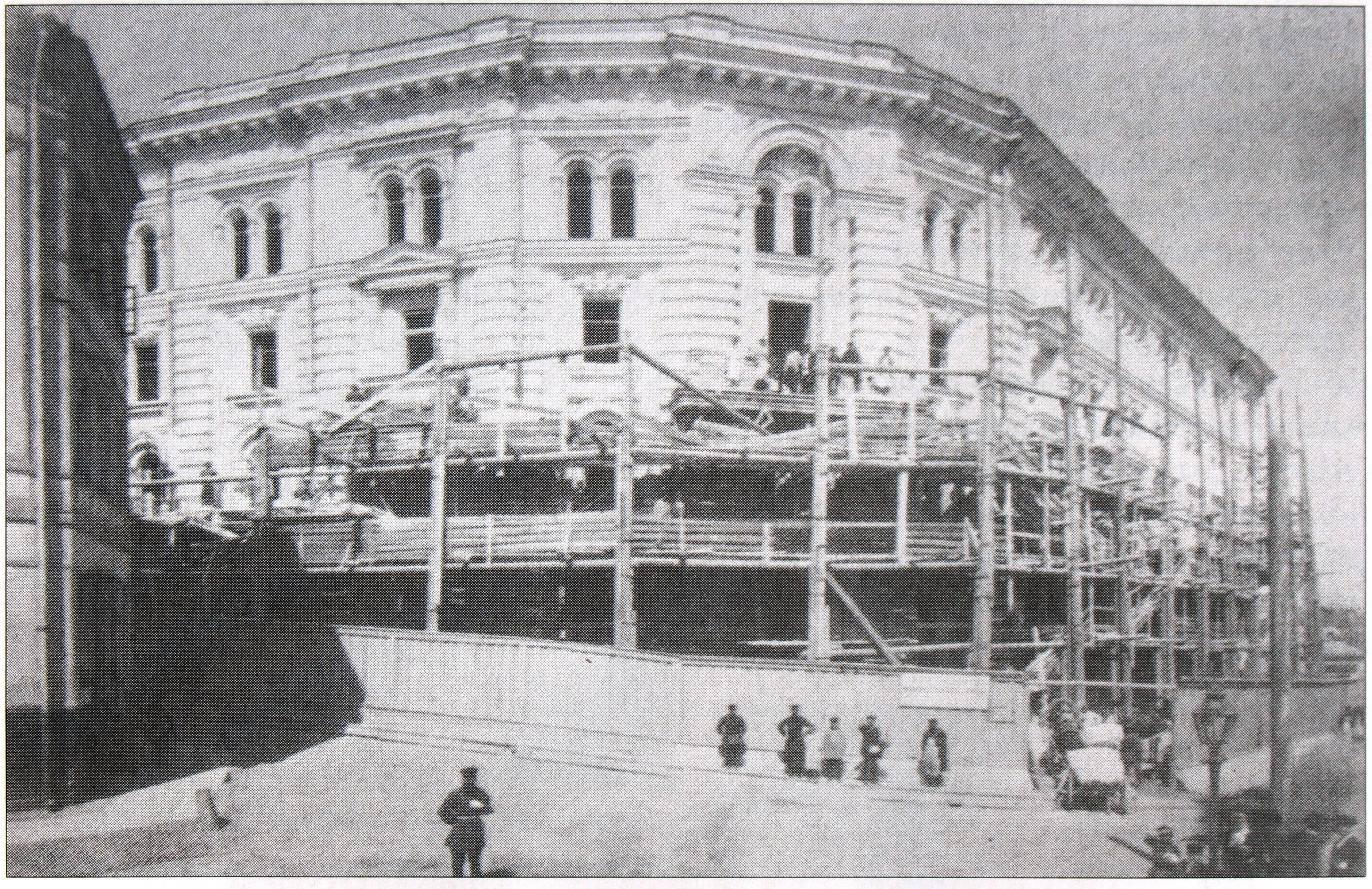 Перестройка Варваринского подворья на Варварке под доходный и конторский дом. Архитектор Клейн.